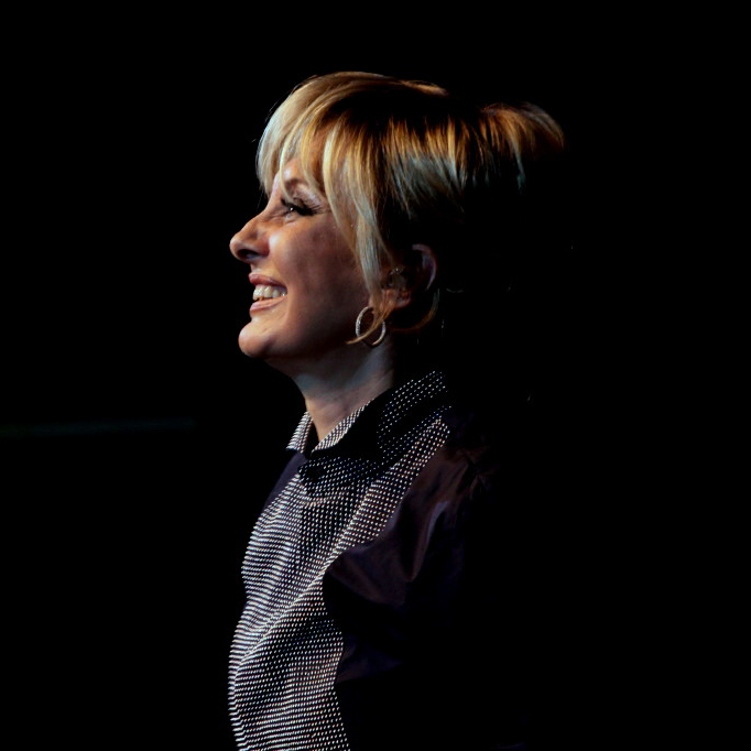 Googoosh Malaysia 2009.